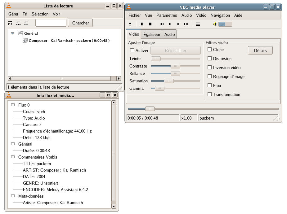 Vlc in French.